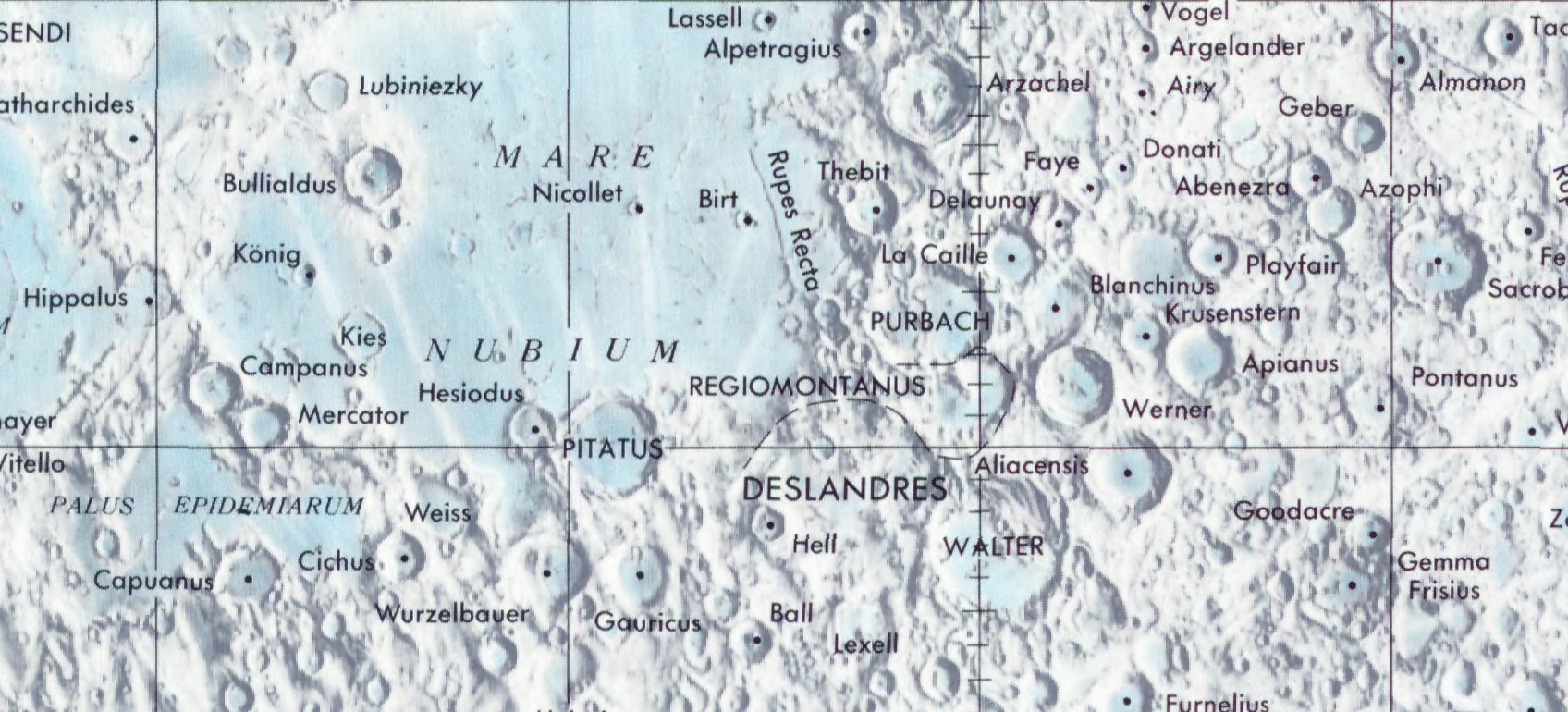 Cráter lunar Regiomontanus. Localización. (Lunar Chart LPC1. Second Edition)